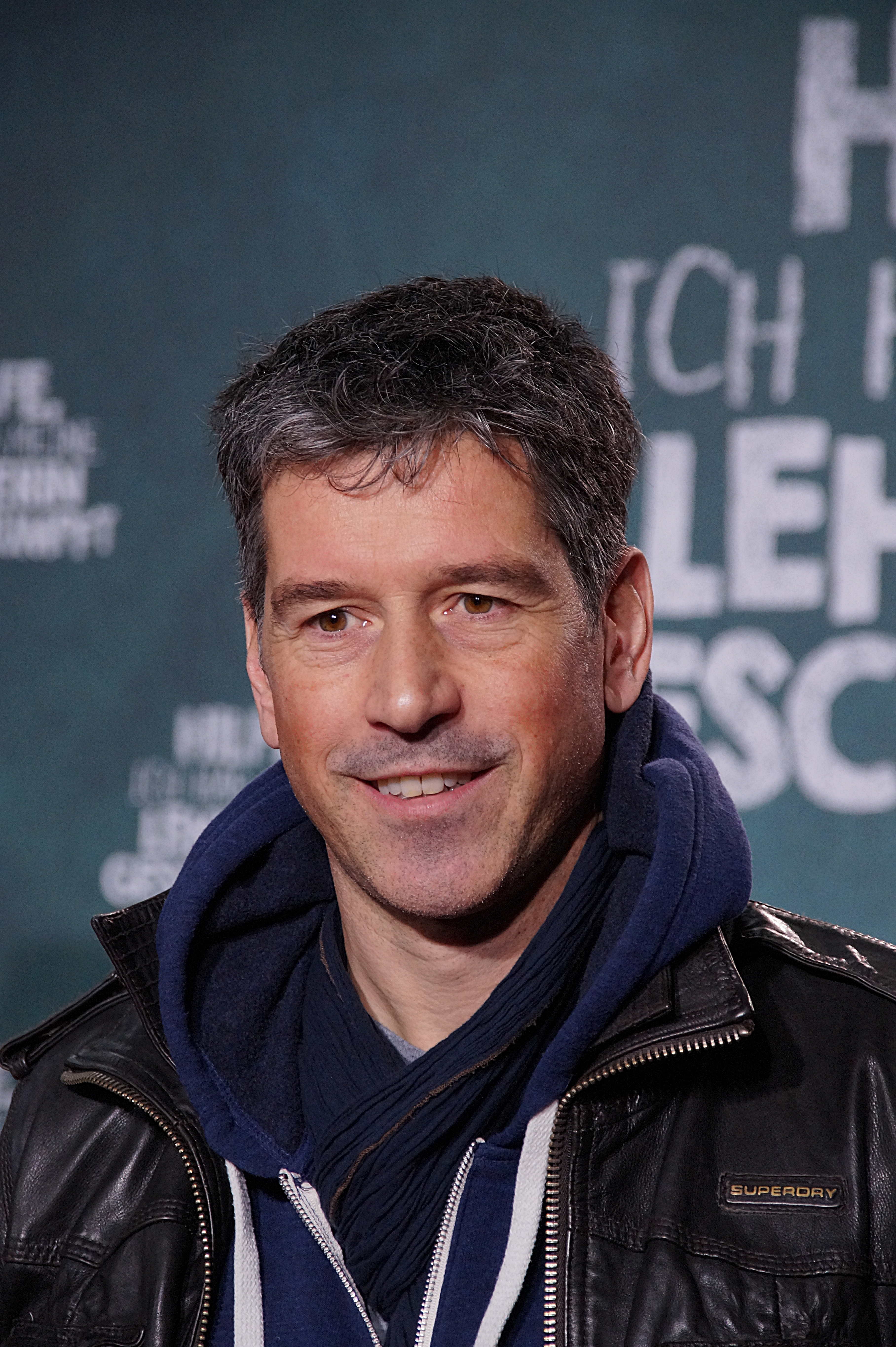 Wolfgang Groos bei der Premiere von "Hilfe, ich habe meine Lehrerin geschrumpft", im Dezember 2015.